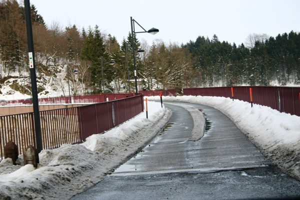 Talspär Robertville, d'Strooss op der Mauer.